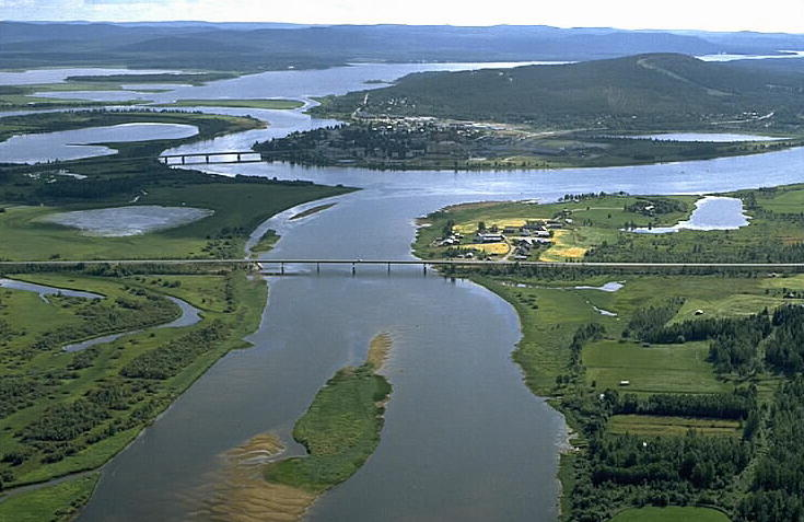 Sammanflödet Kalixälv och Ängesån. Motiv: Överkalix Nyckelord: Flygbilder, Riksintressen Kategori: Insjömiljöer Sammanflödet Kalixälv och Ängesån.